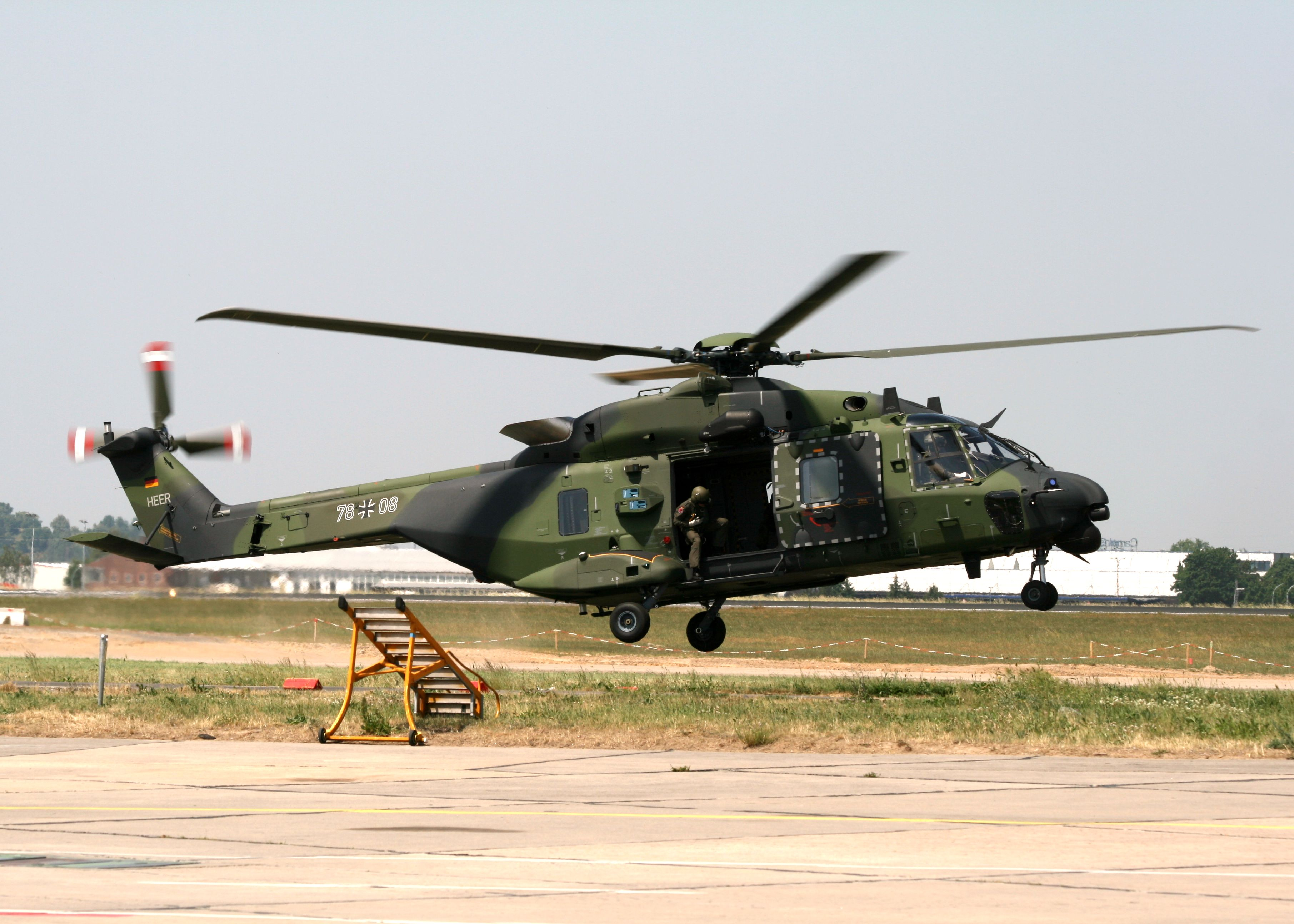 ILA 2008-15